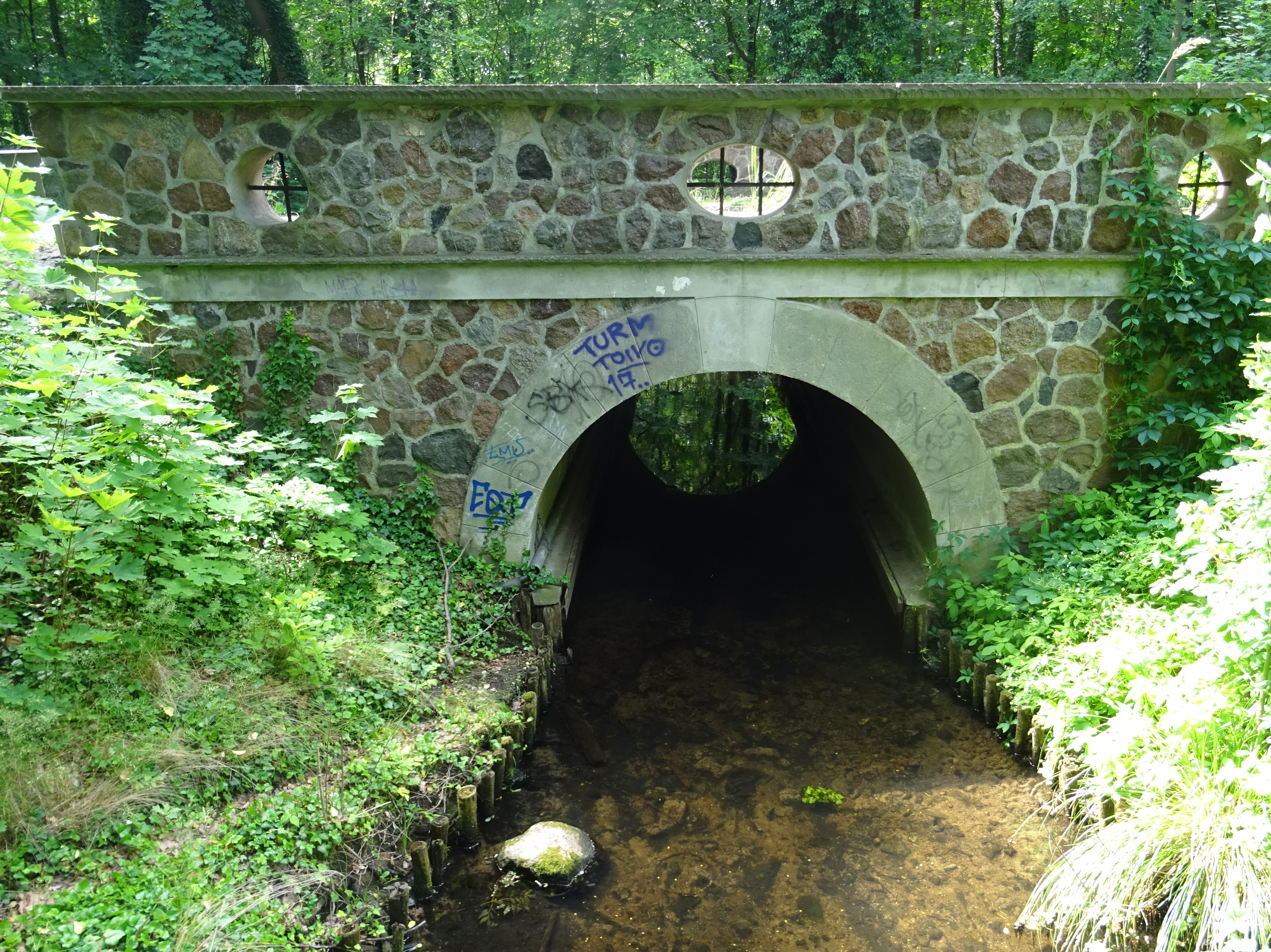 Königs Wusterhausen, denkmalgeschützte Rundbogenbrücke Storkower Straße